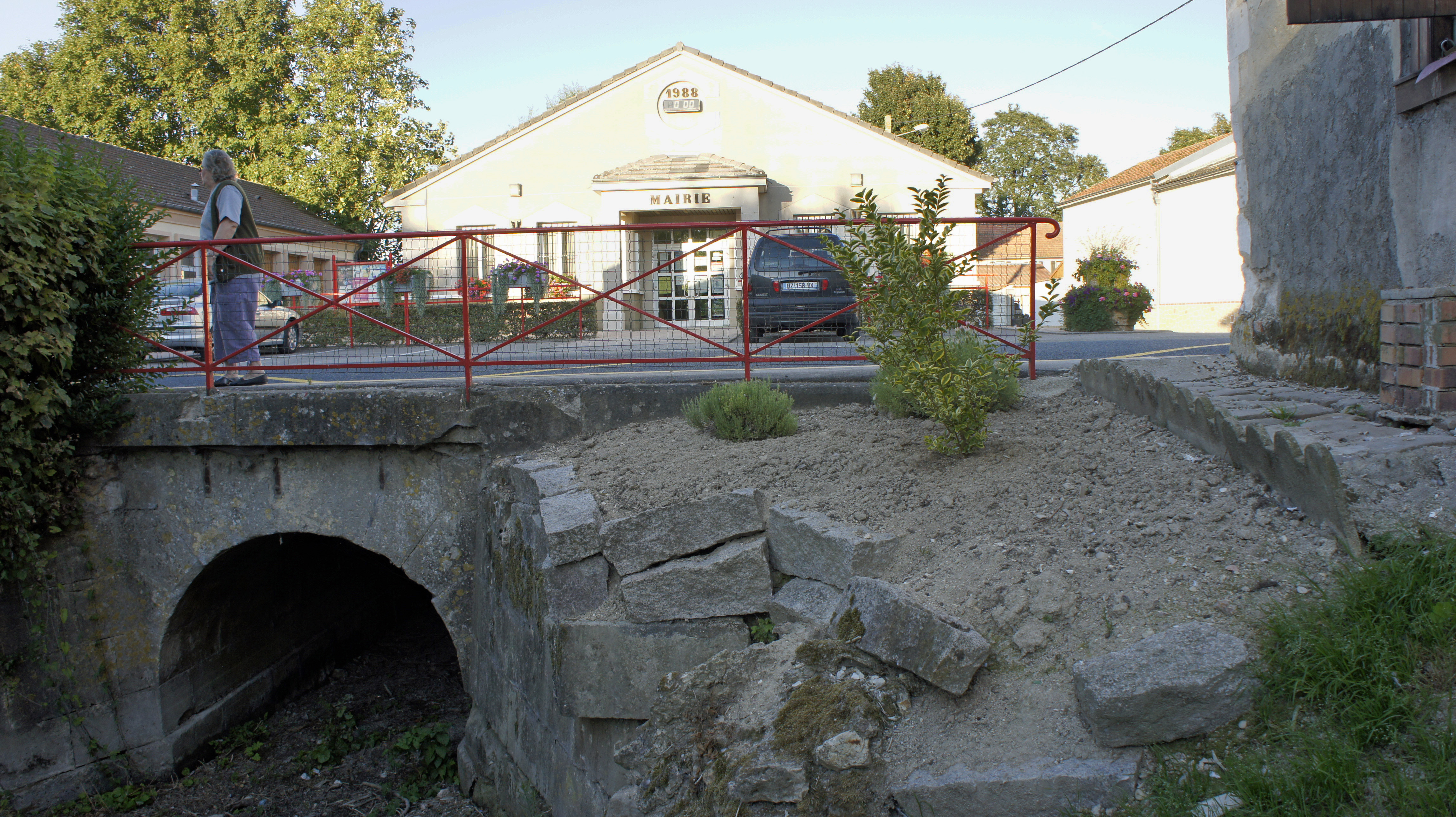 Mairie et ruisseau à la Veuve